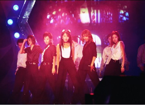 5월 25일 mnet에서 첫 무대를 가지고 있는 베이비복스